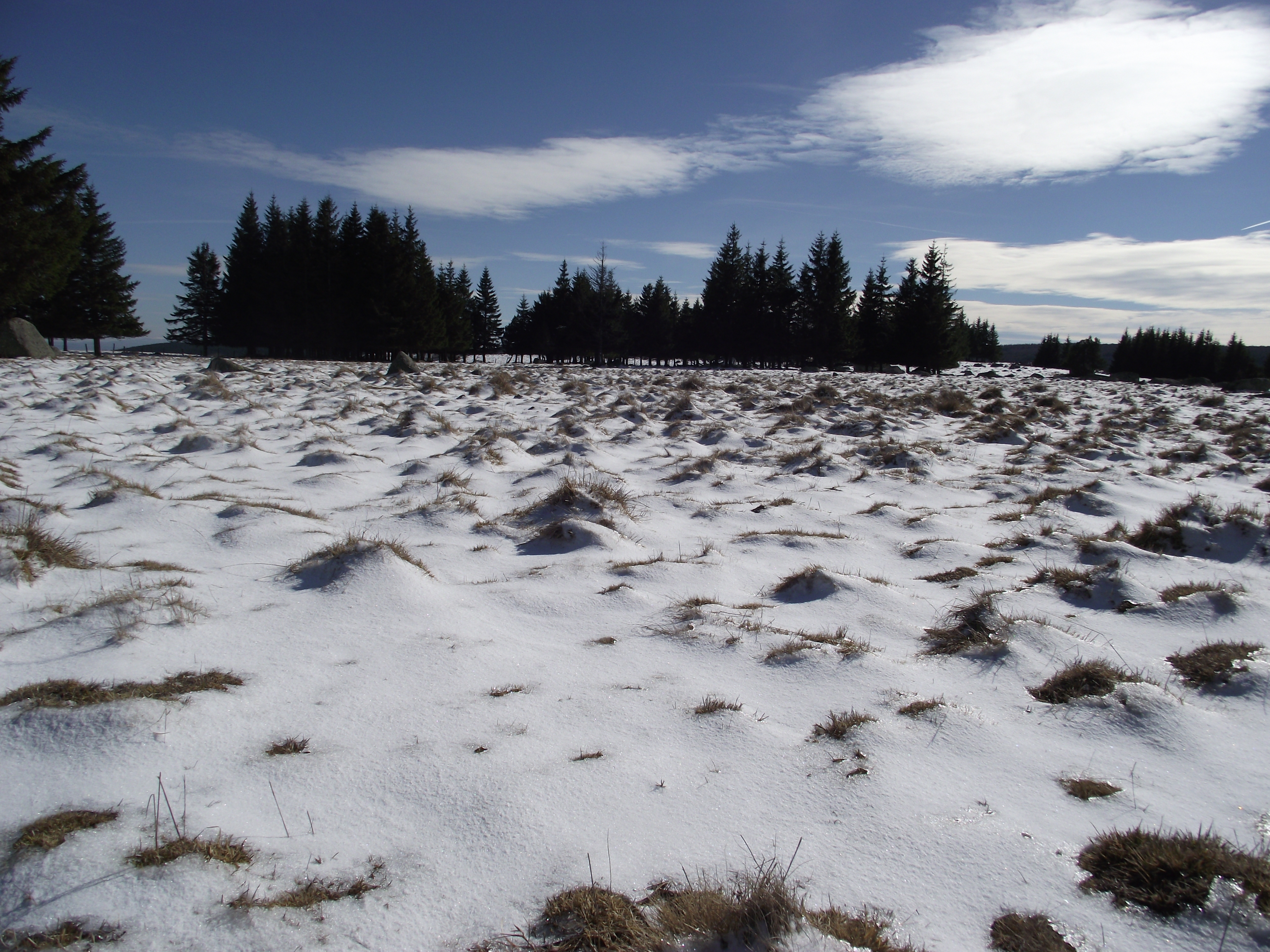 Buttes gazonnées dans les monts d'Aubrac (Massif central, France)